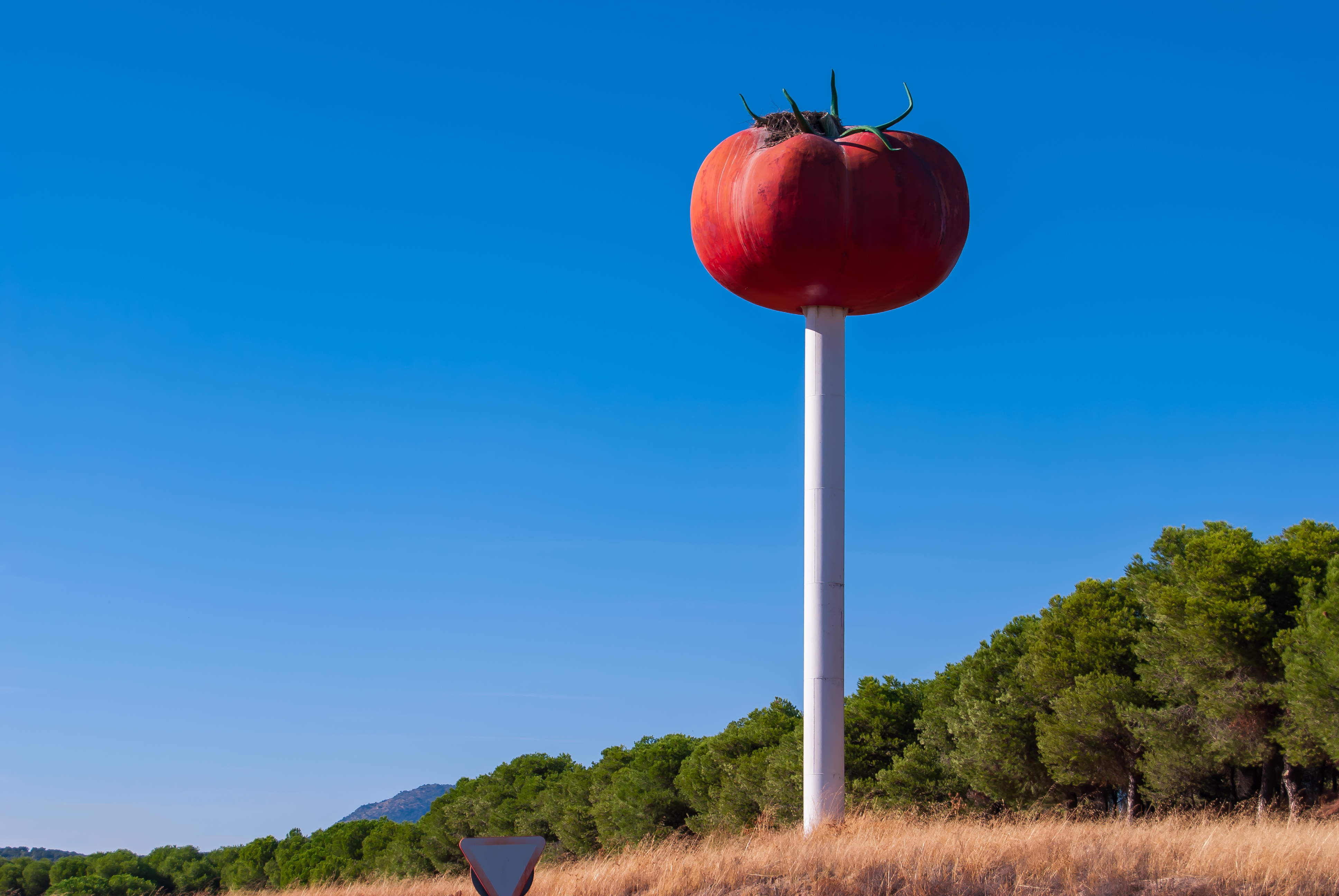 Miajadas